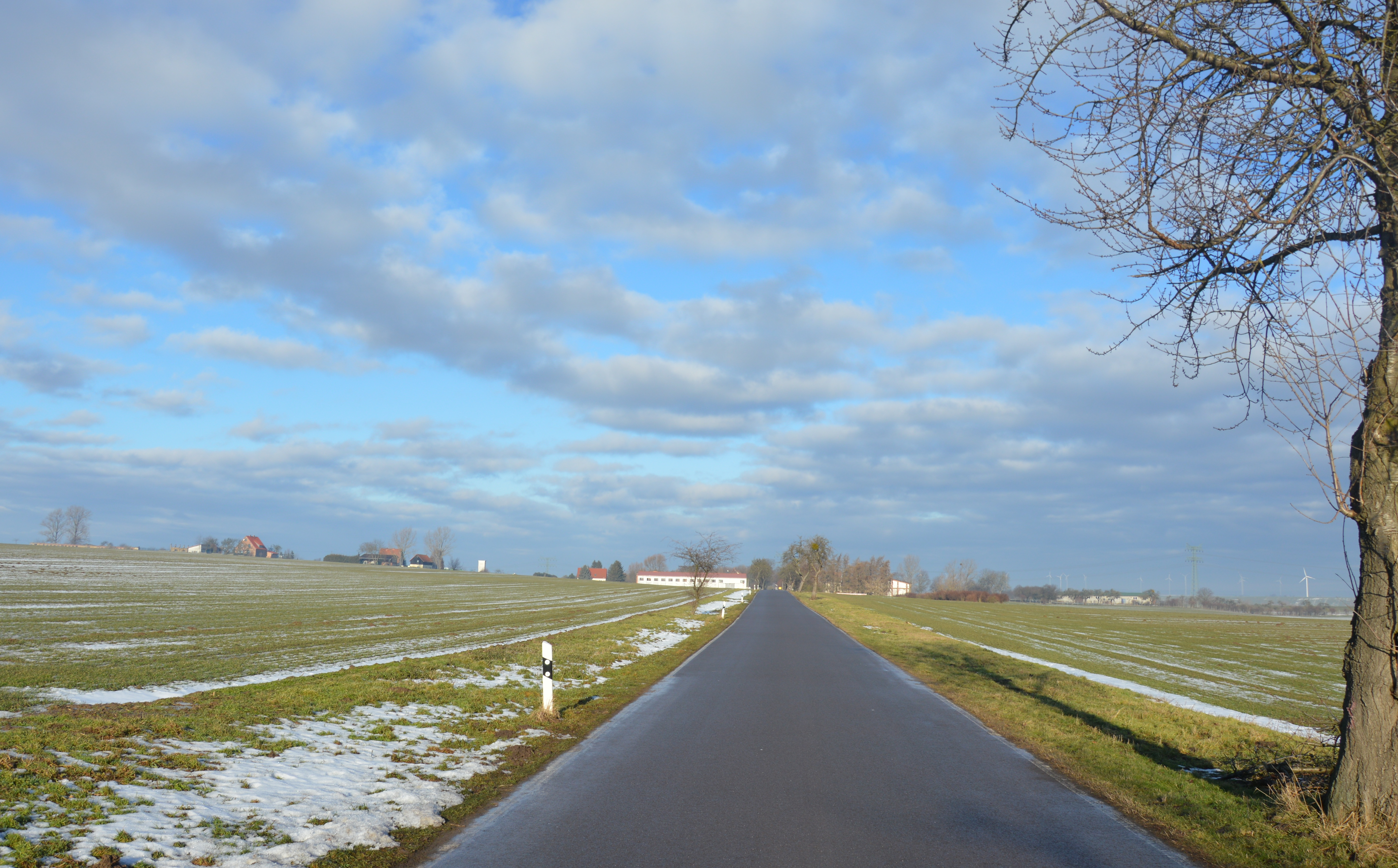 Neu Ummendorf